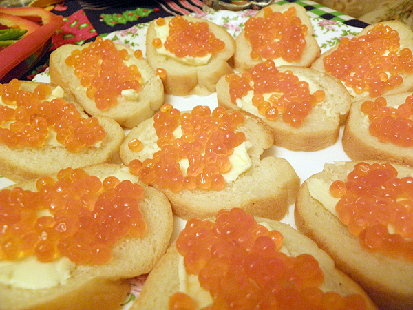 бутерброды с красной икрой